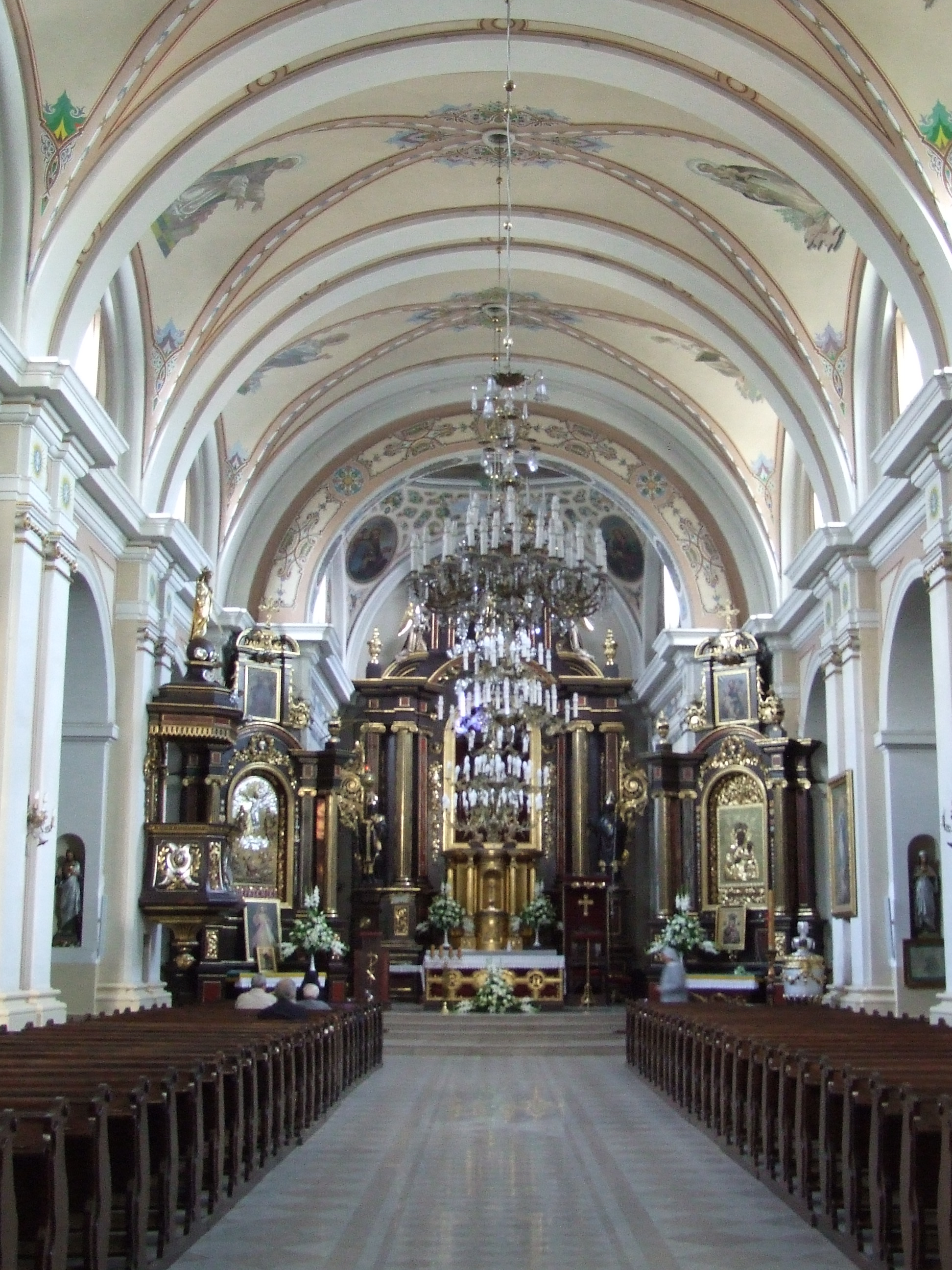 neobarokowy, rzymskokatolicki kościół parafialny pod wezwaniem Zwiastowania Najświętszej Marii Panny; wnętrze Żelechów, Żelechów